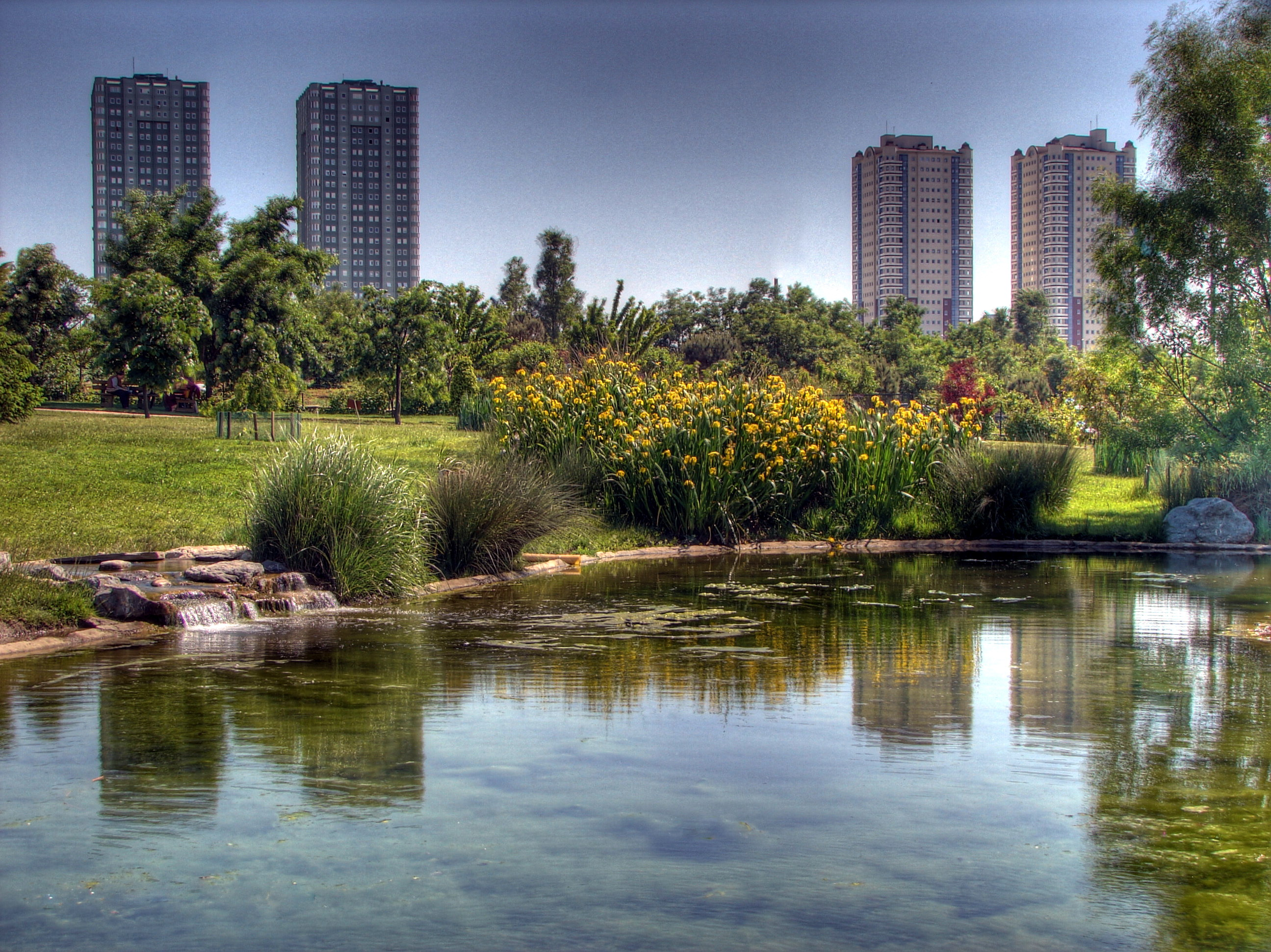 Tema Park, Istanbul